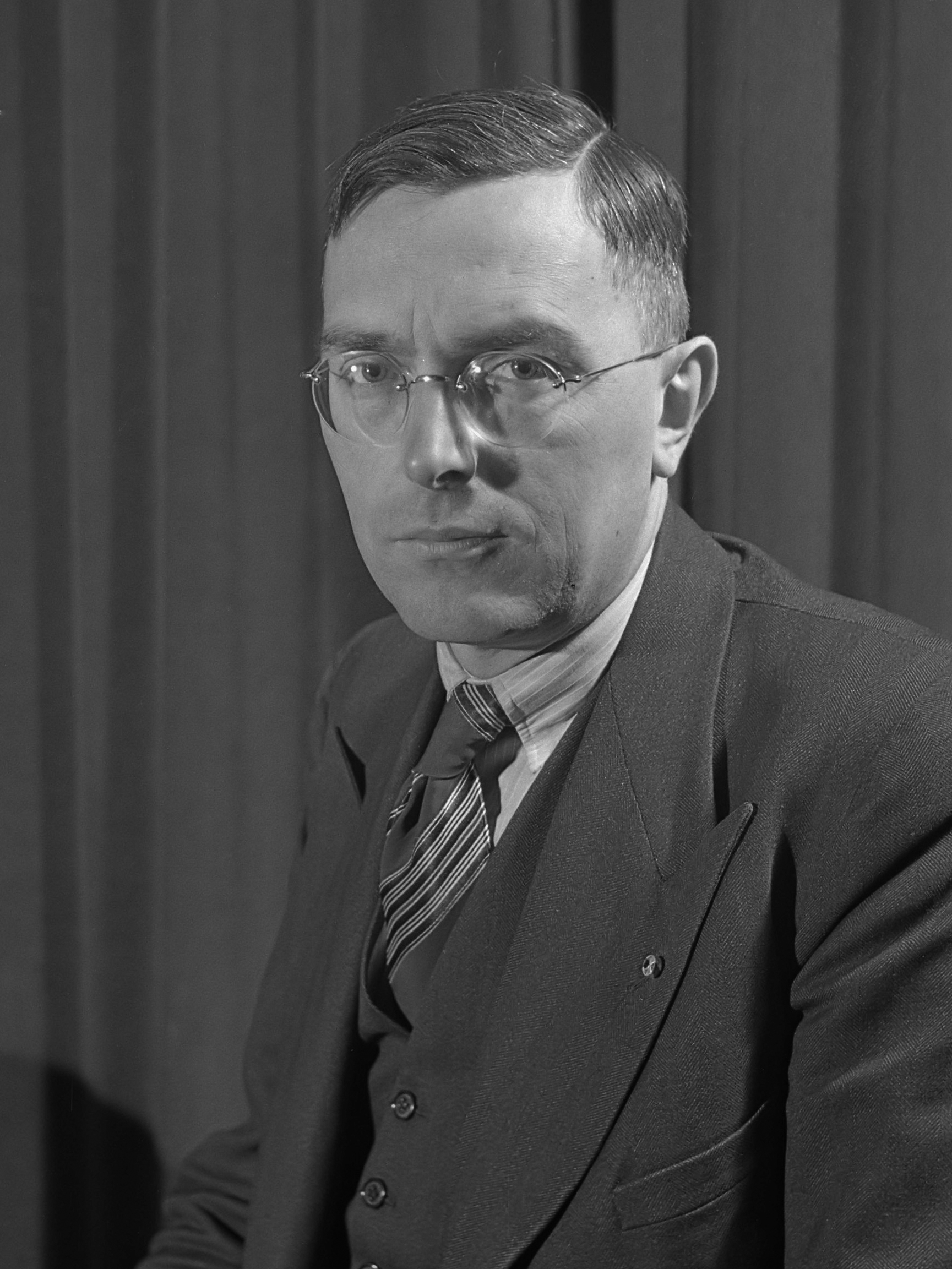 Schaakgrootmeester Dr. Max Euwe 16 november 1945